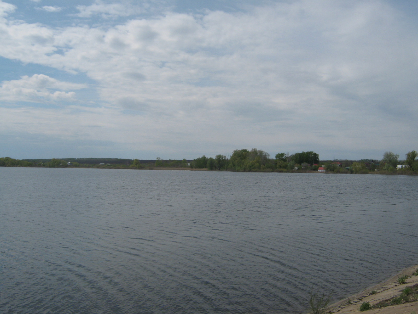 Чёрновское водохранилище, Волжский район, Самарская область.